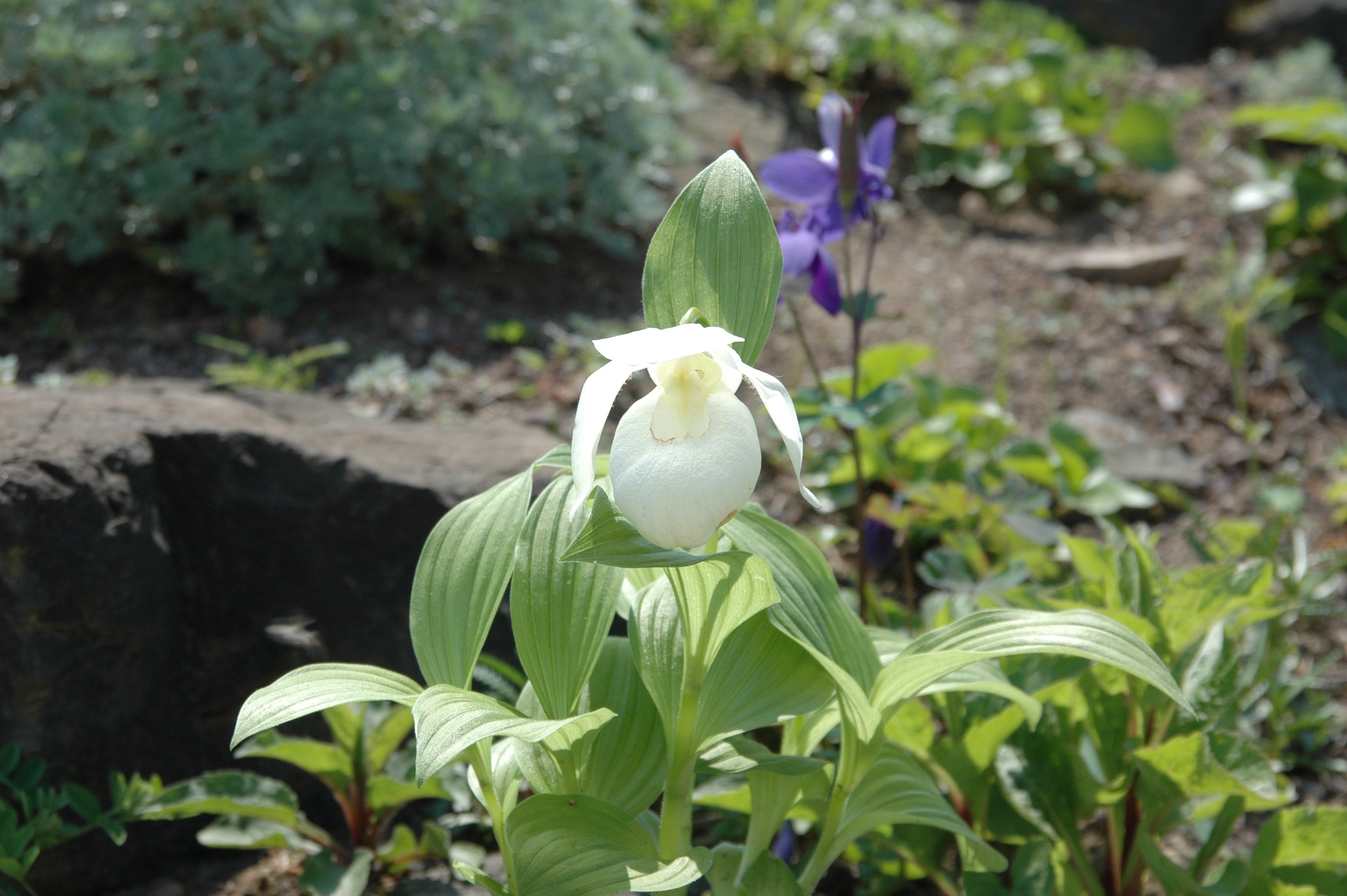 Cypripedium macranthos var. rebunense (レブンアツモリソウ), Rebun, Hokkaido, Japan.